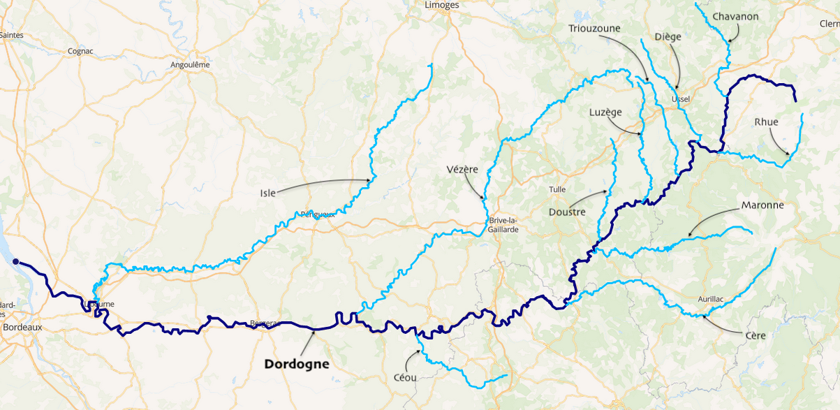 carte réalisée sur umap This map may be incomplete, and may contain errors. Don't rely solely on it for navigation.